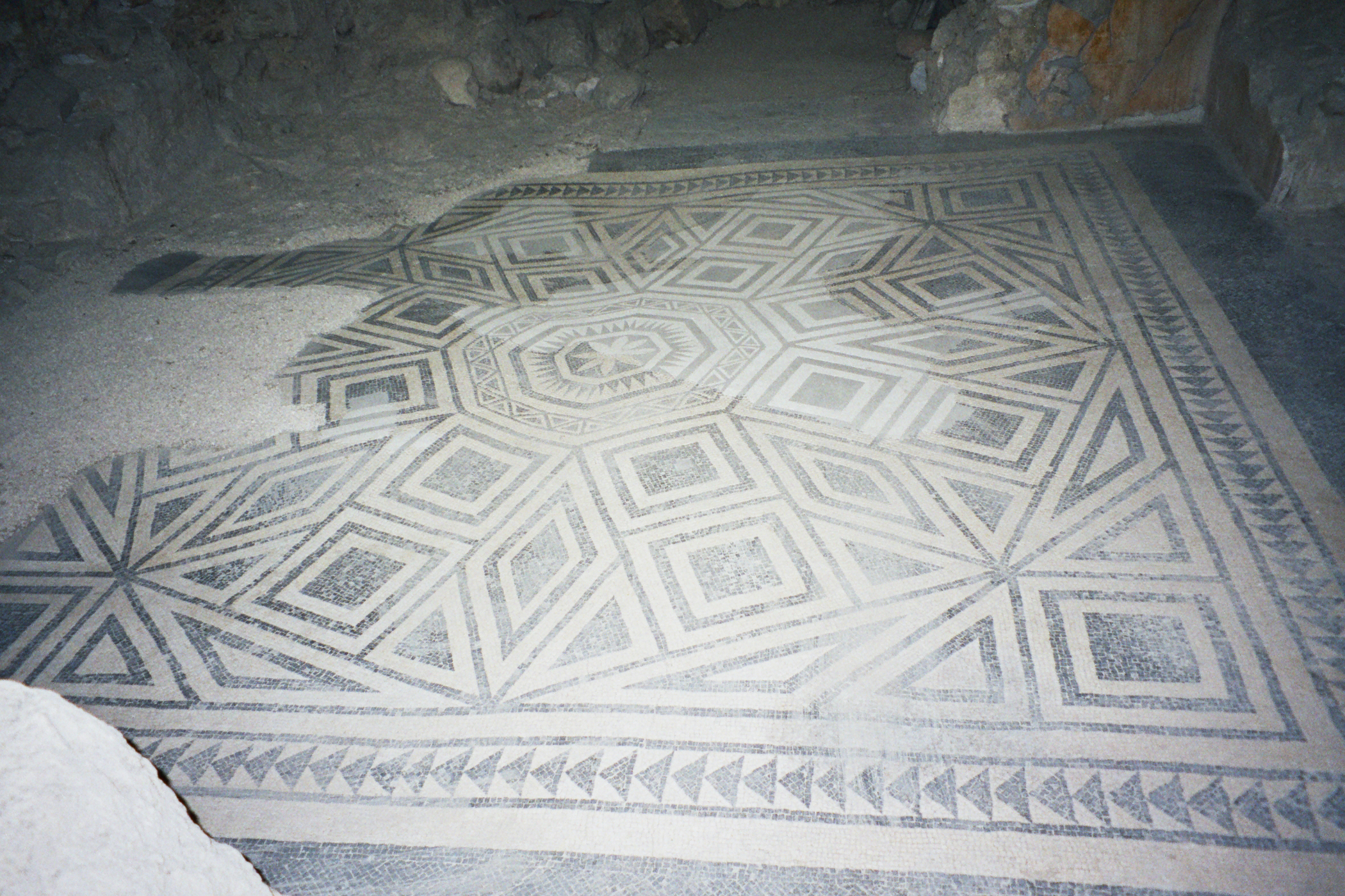 Cubicolo